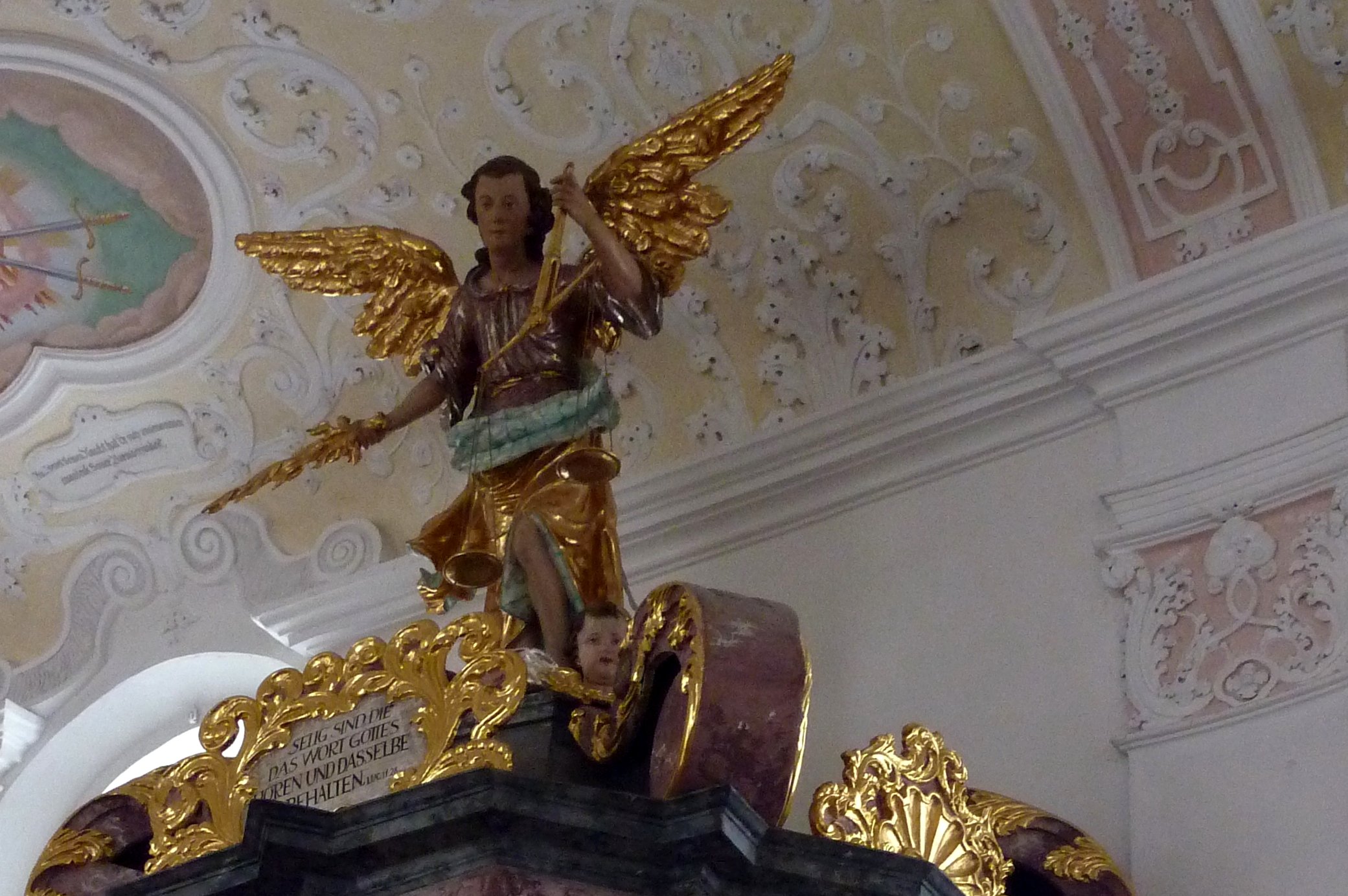 Katholische Pfarrkirche St. Martin in Holzheim bei Dillingen an der Donau, Kanzel von 1715, auf dem Schalldeckel Skulptur des Erzengels Michael, der die Seelen wiegt, vermutlich von Franz Schefferle, um 1680